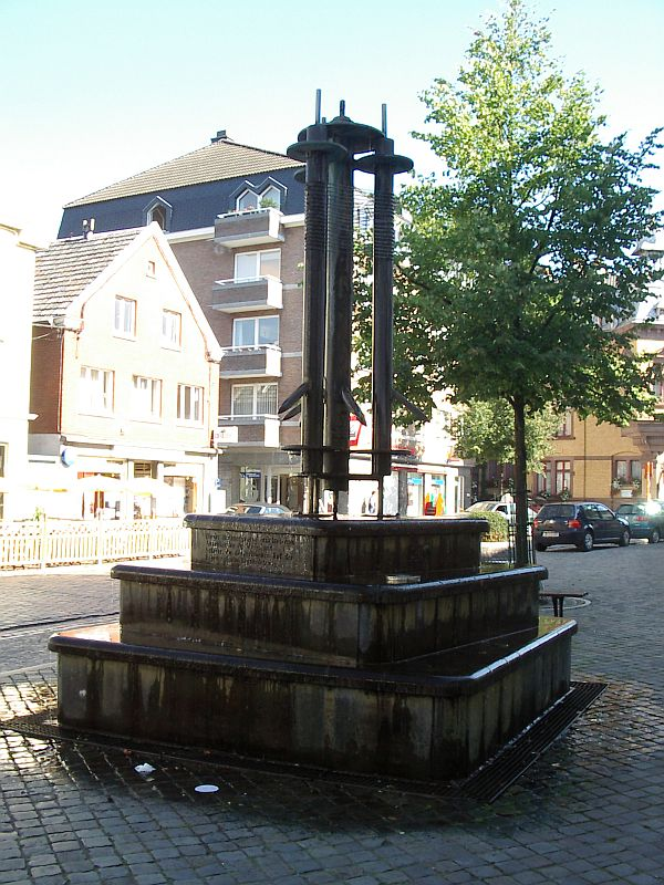 Der Weberbrunnen in Eupen (Belgien)